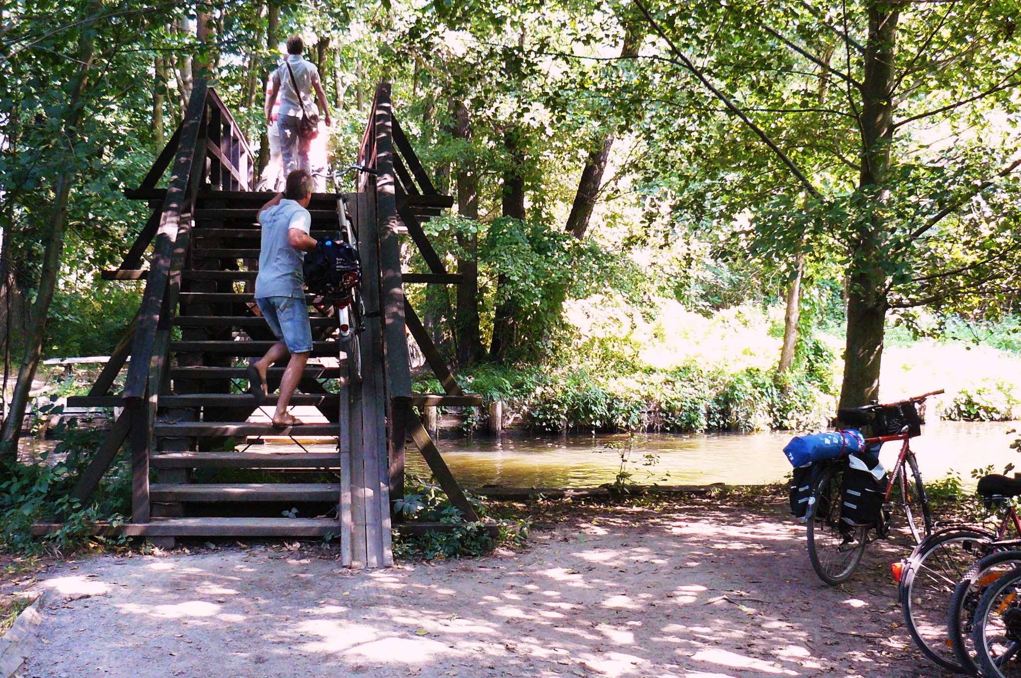 Gurkenradweg. Szlak ogórkowy, Spreewald.